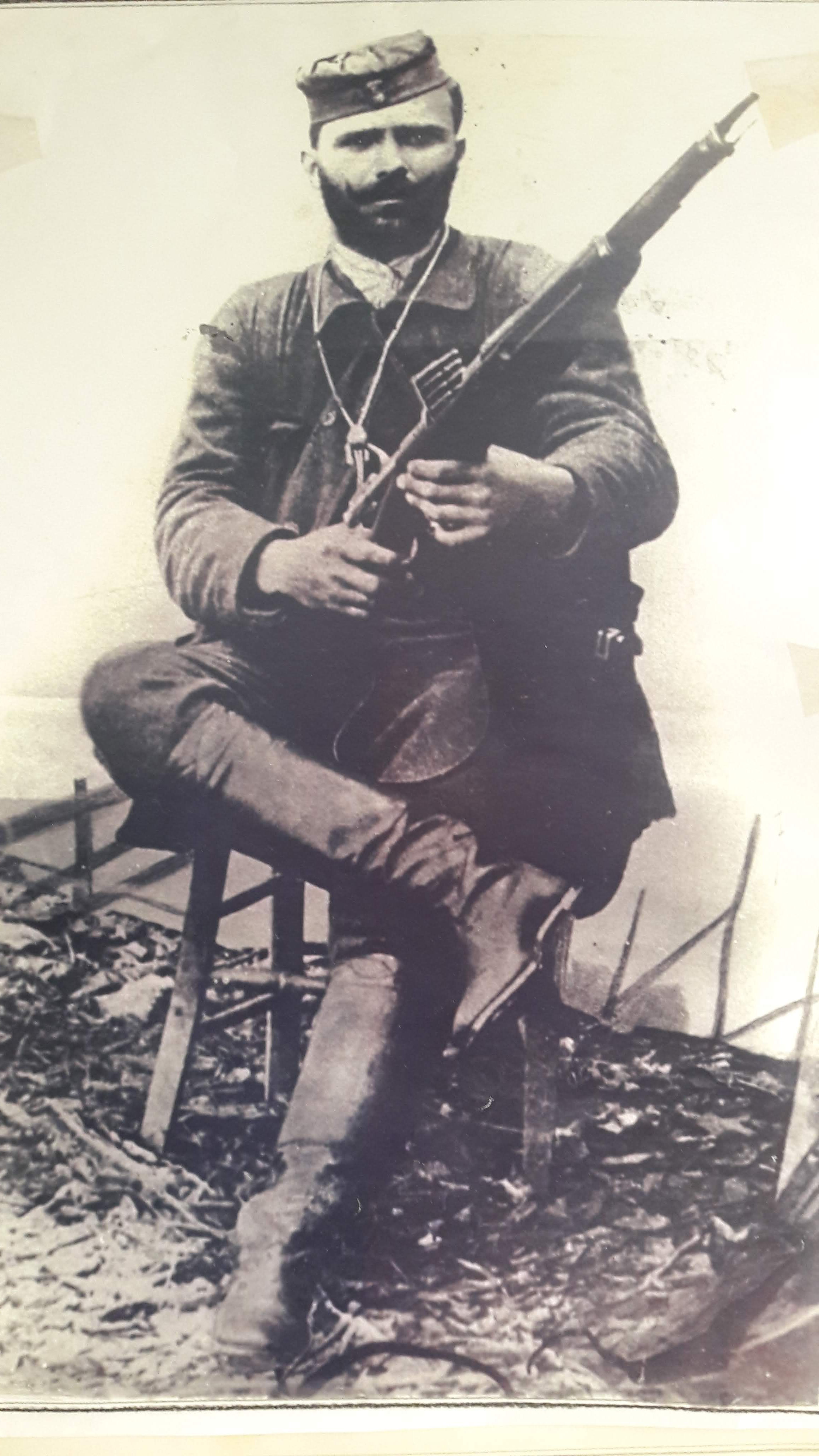 Περικλής Δράκος, Μακεδονομάχος από την Καβάλα